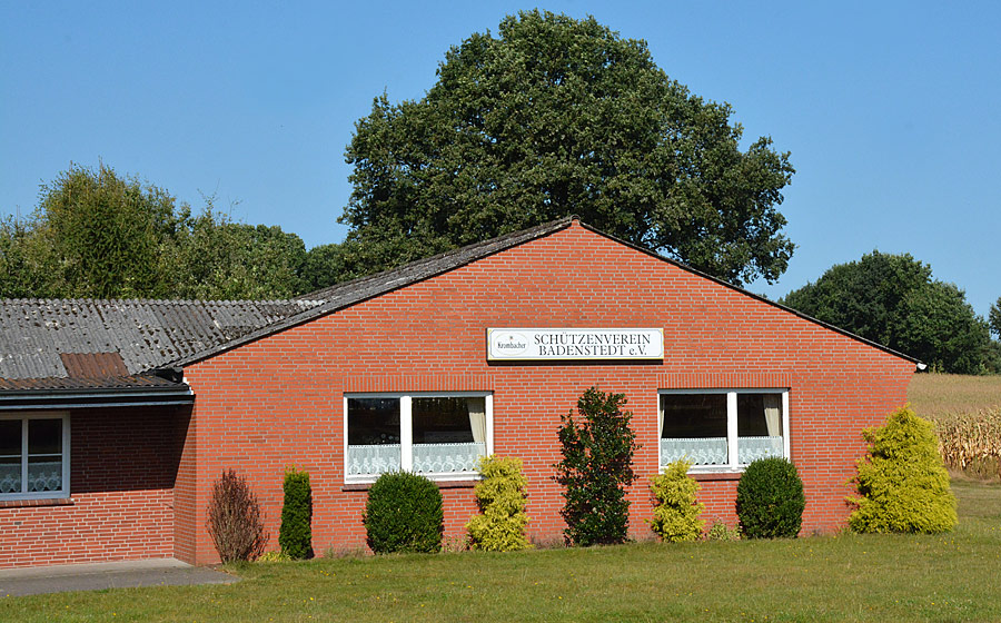 Badenstedt Schützenverein